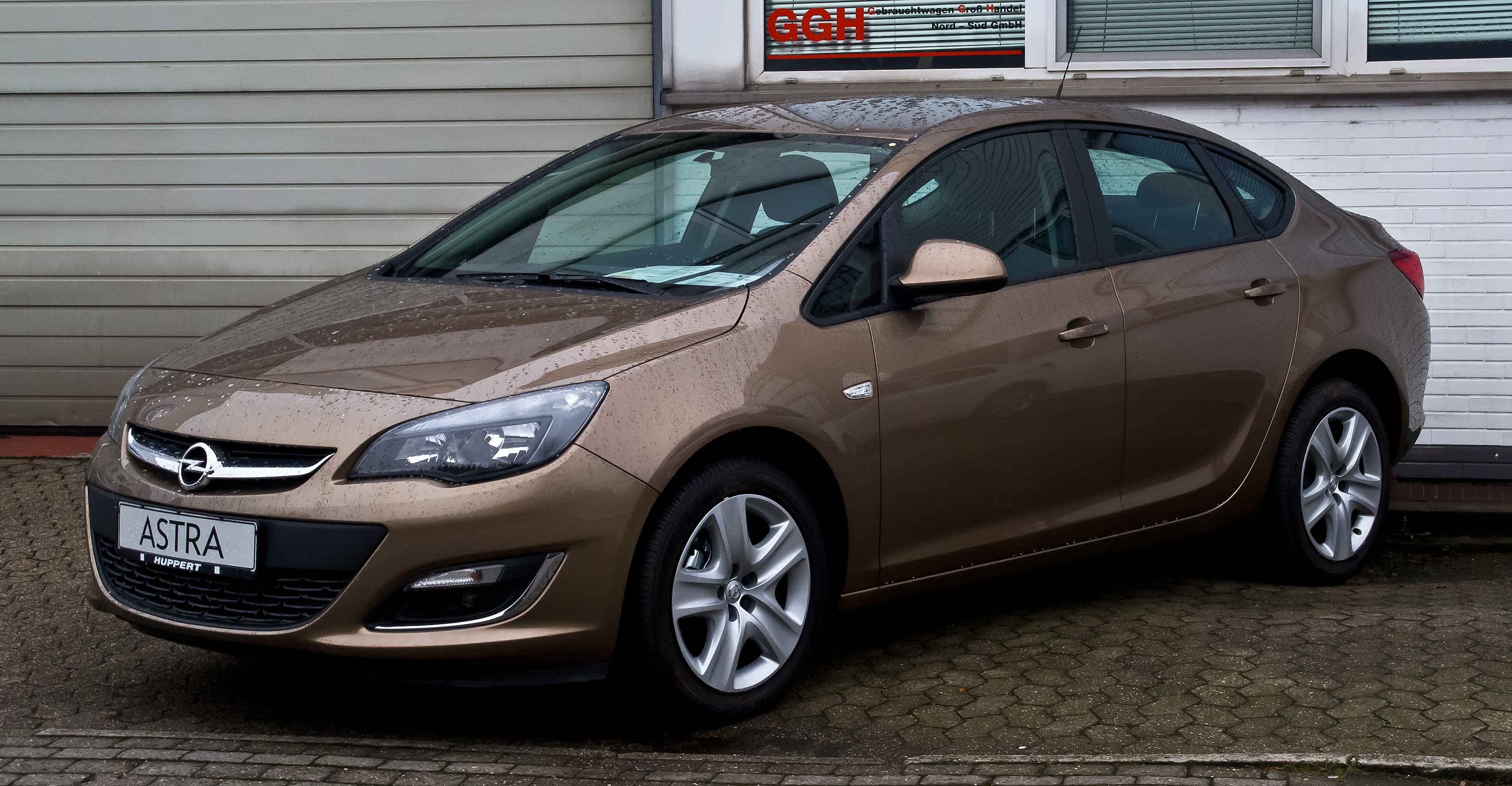 Opel Astra Stufenheck 1.6 Edition (J, Facelift)